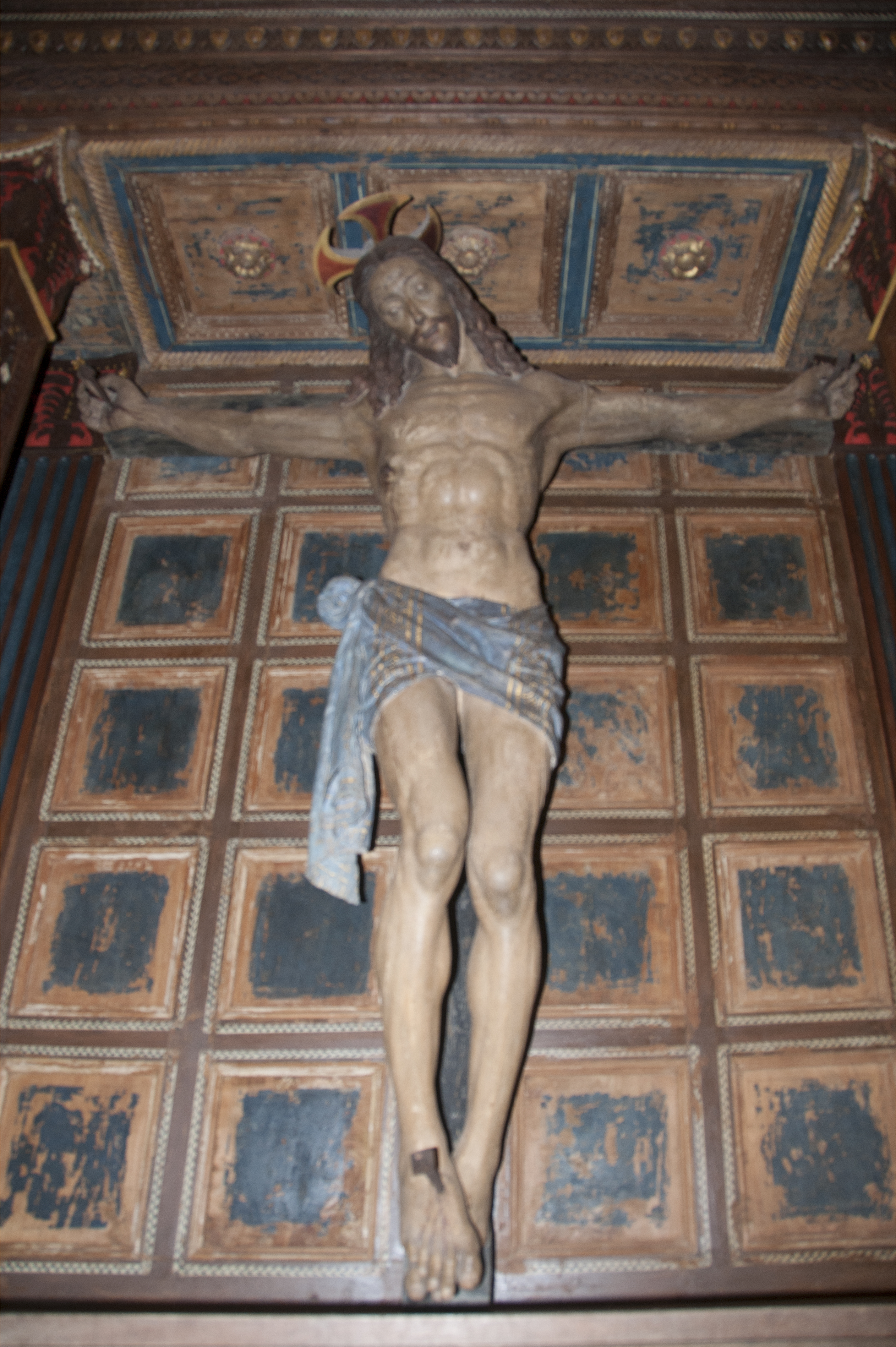 Chiesa della Madonna Bianca - Ancarano